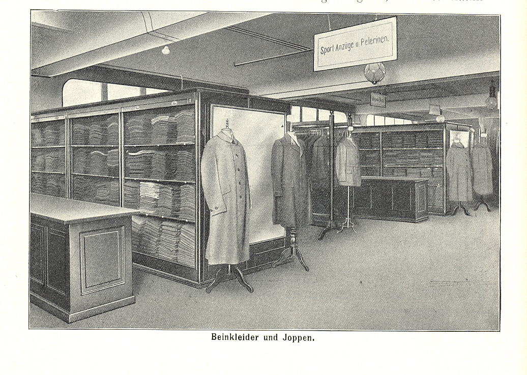 Тооговый дом "Бройнингер", отдел мужской одежды, 1889 год